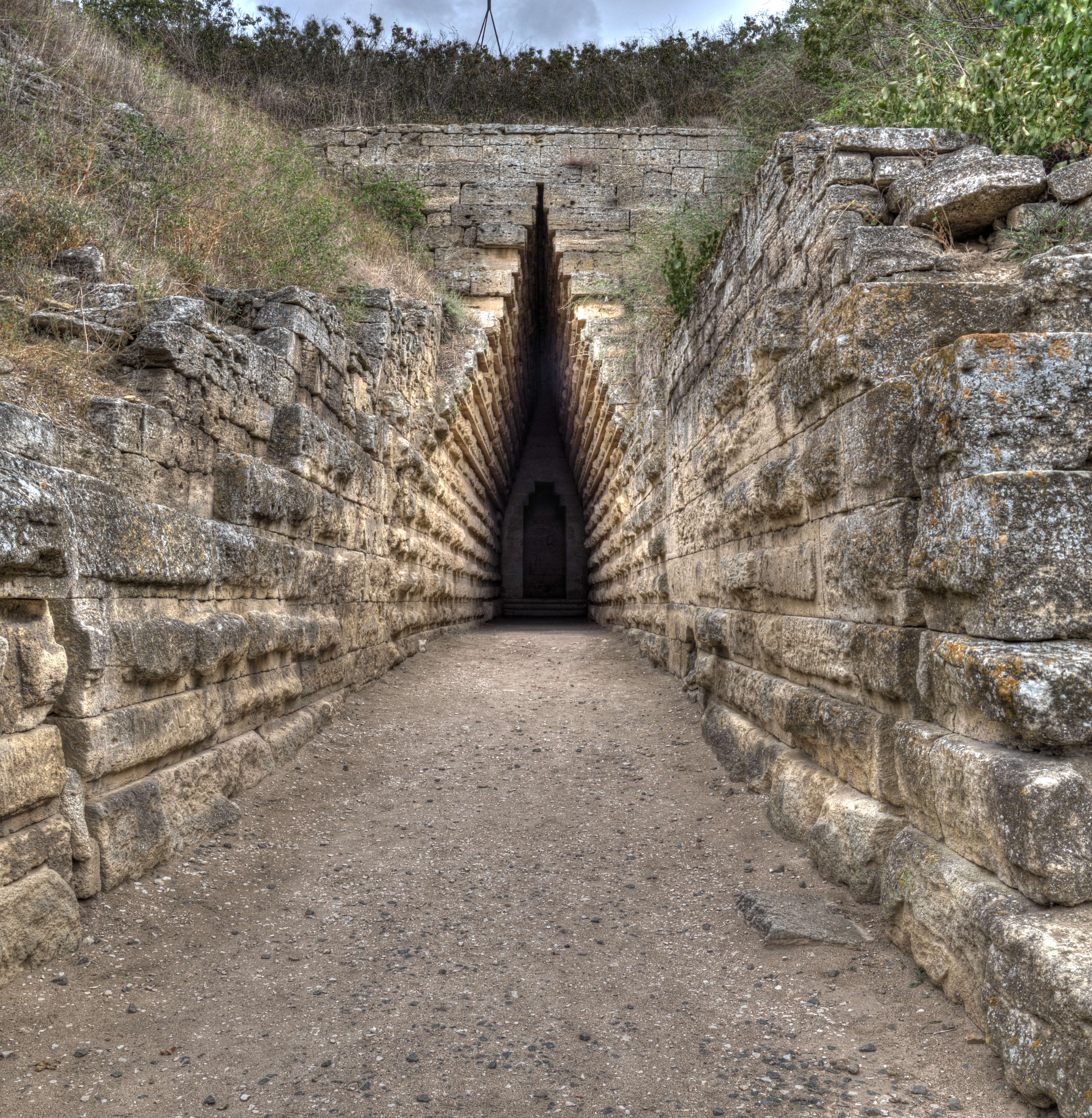 Царський курган, Керч, біля Аджимушкайських каменярень (400–500 м на схід)